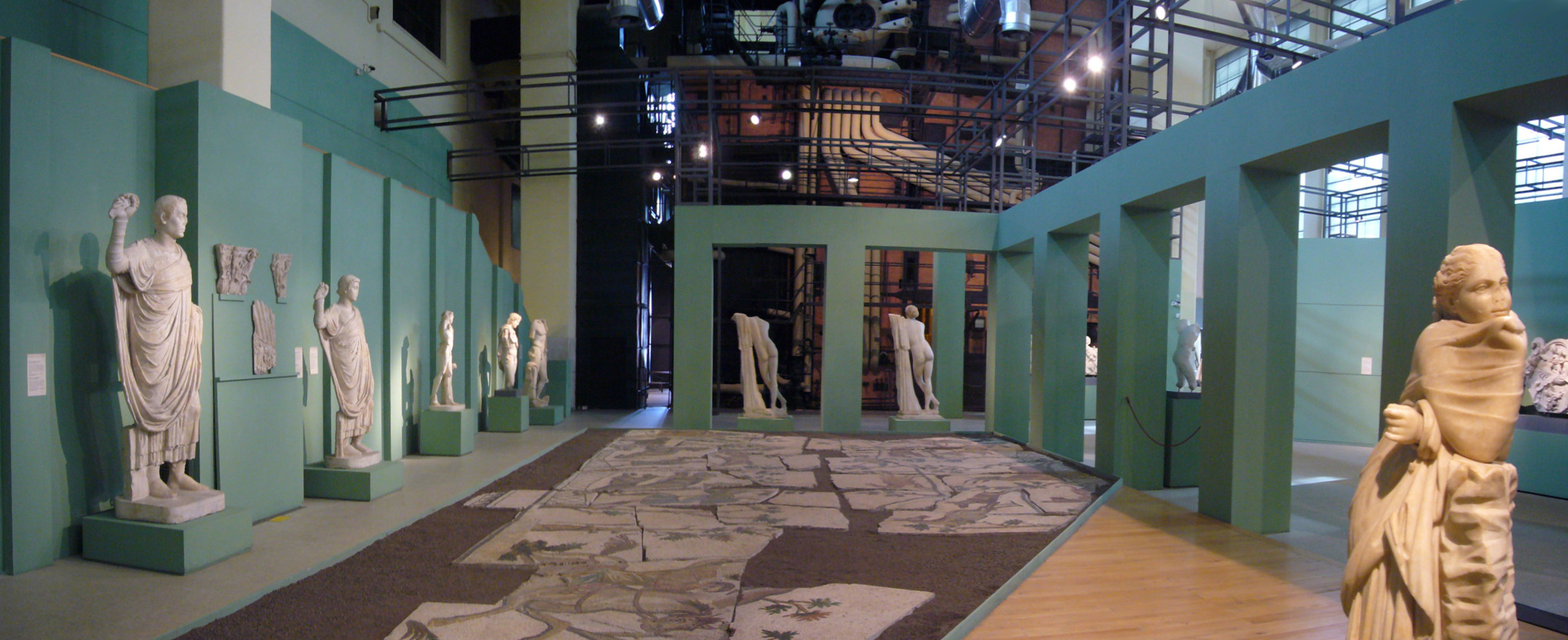 Centrale Montemartini a Roma: sala Caldaie e mosaico di santa Bibiana. Centrale Montemartini Native nameCentrale MontemartiniLocationRome, ItalyCoordinates41° 52′ 00.48″ N, 12° 28′ 41.12″ E Established2005Web page control : Q1054090 VIAF: 268486794 GND: 10105941-3 institution QS:P195,Q1054090